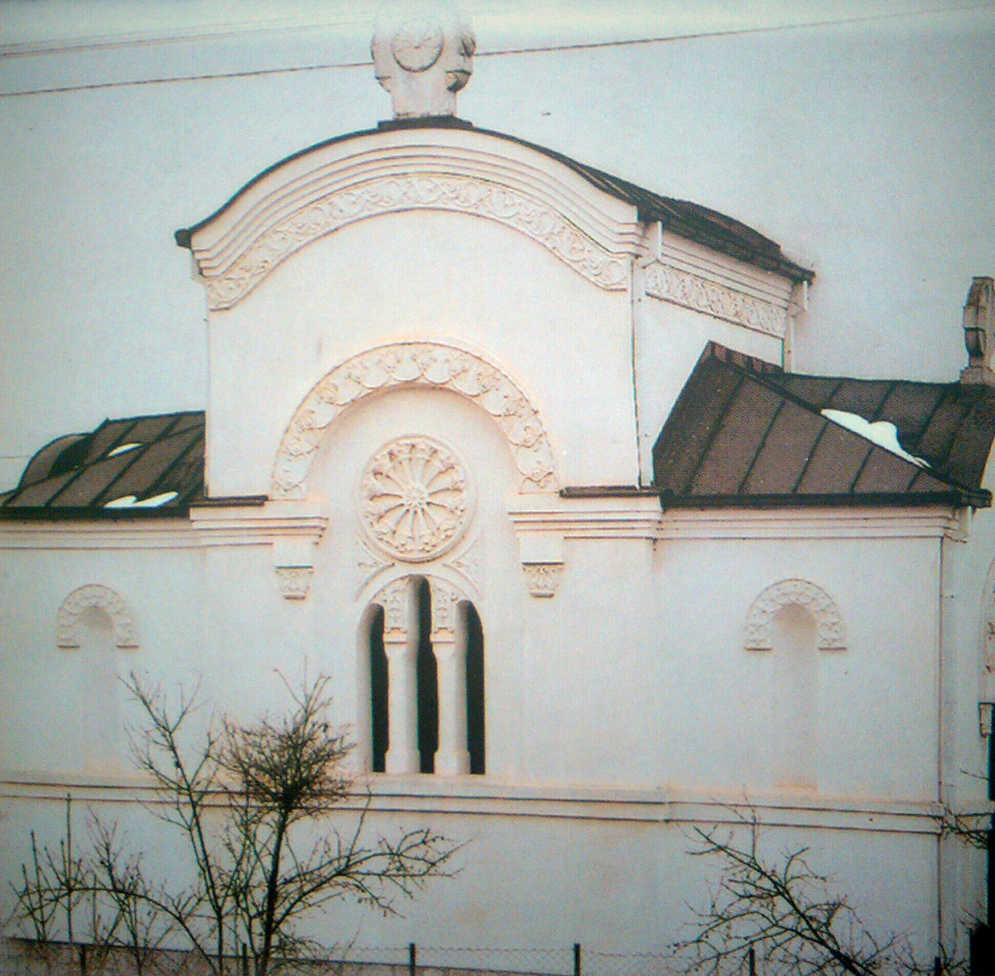 Спомен костурница у Сурдулици